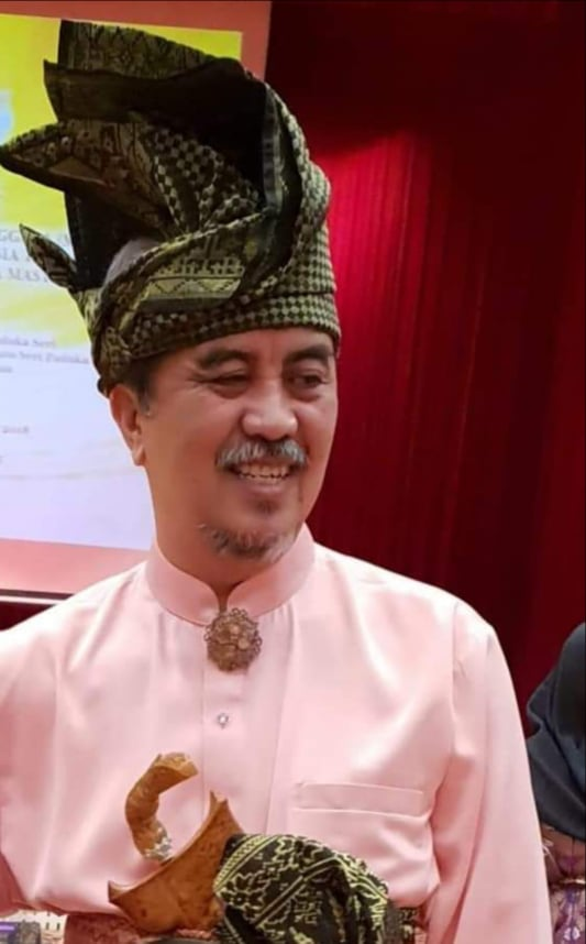 dibuat di Singapura